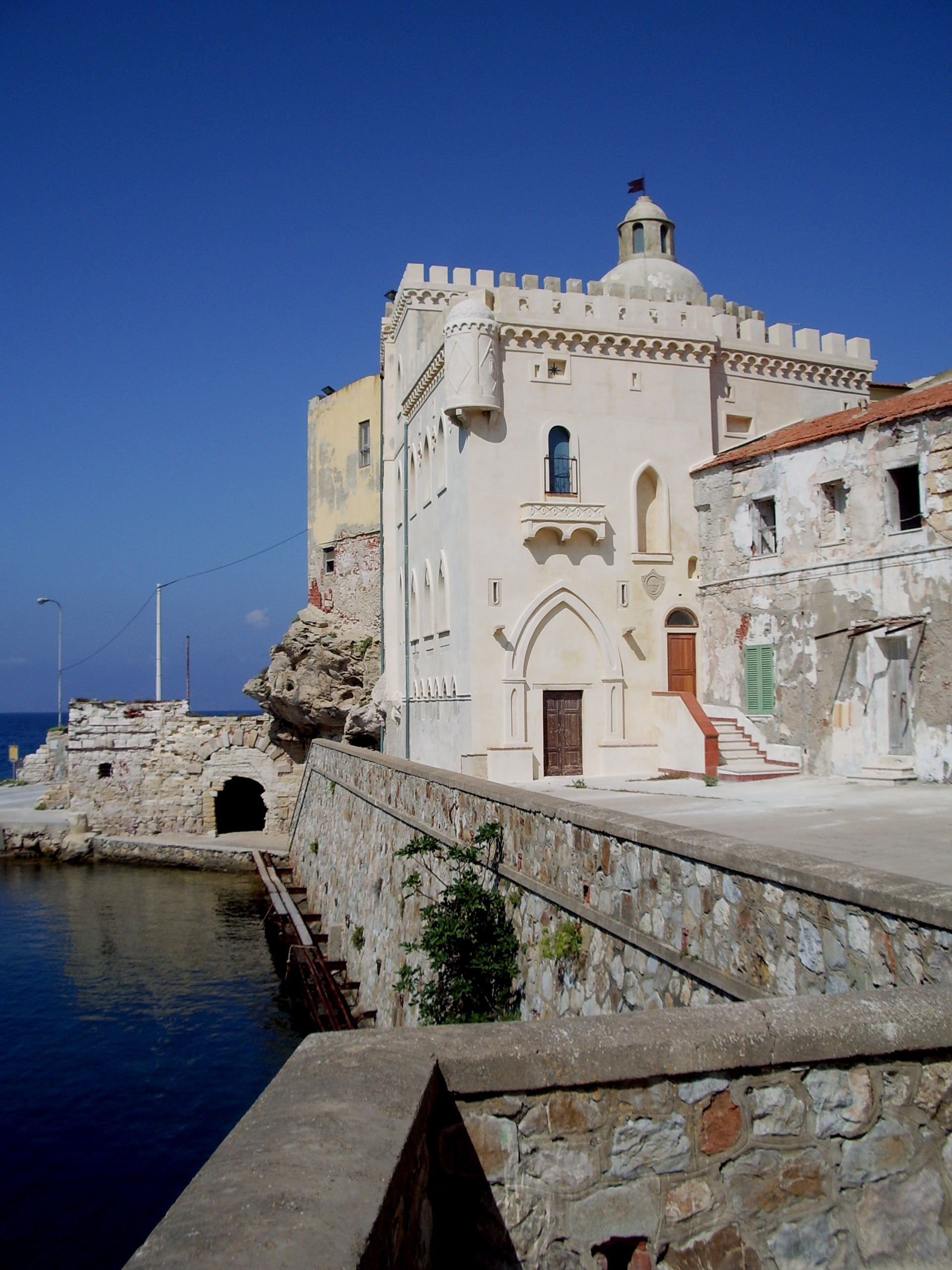 Il Palazzo della Specola sull'Isola di Pianosa (LI)